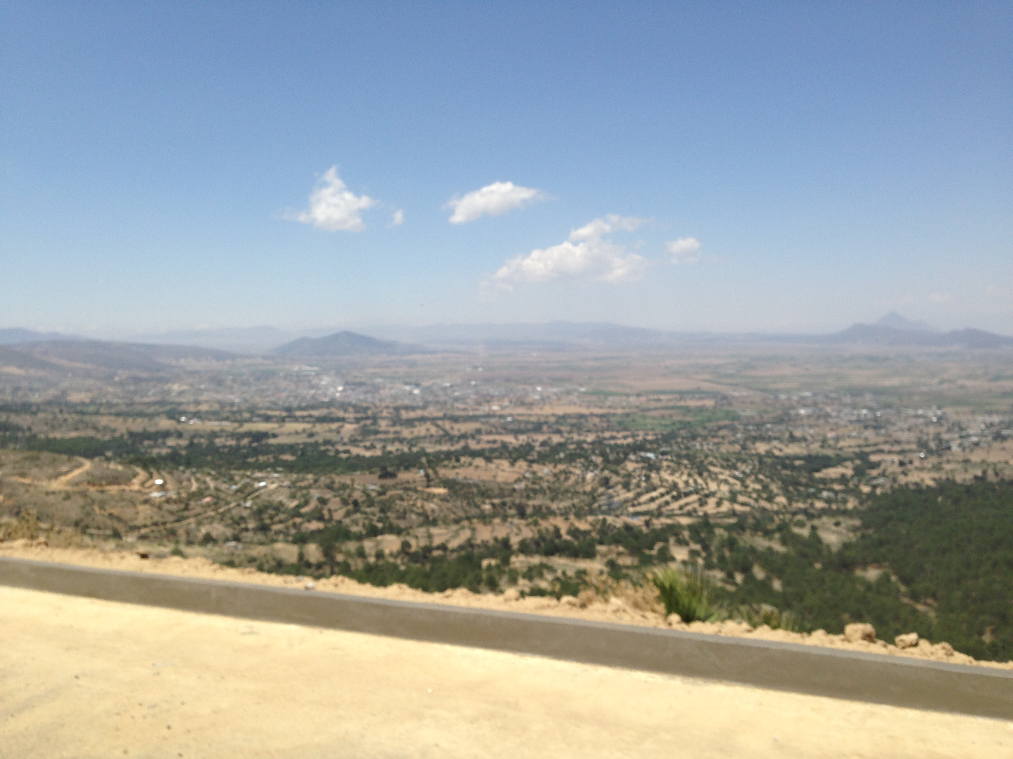 Vista panorámica de la Llanura de Libres Puebla